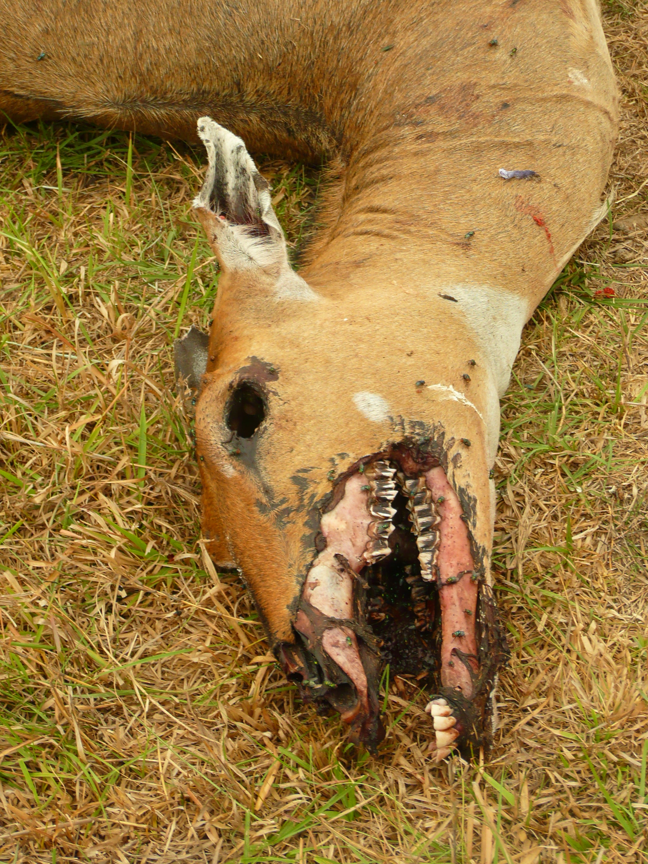 carcasse près d'un point d'eau en Inde